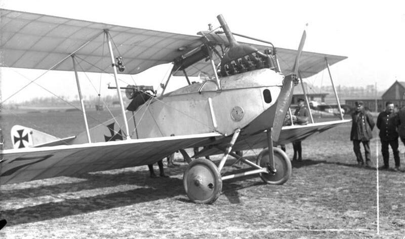 I. Weltkrieg 1914-1918 Menin Albatrosdoppeldecker